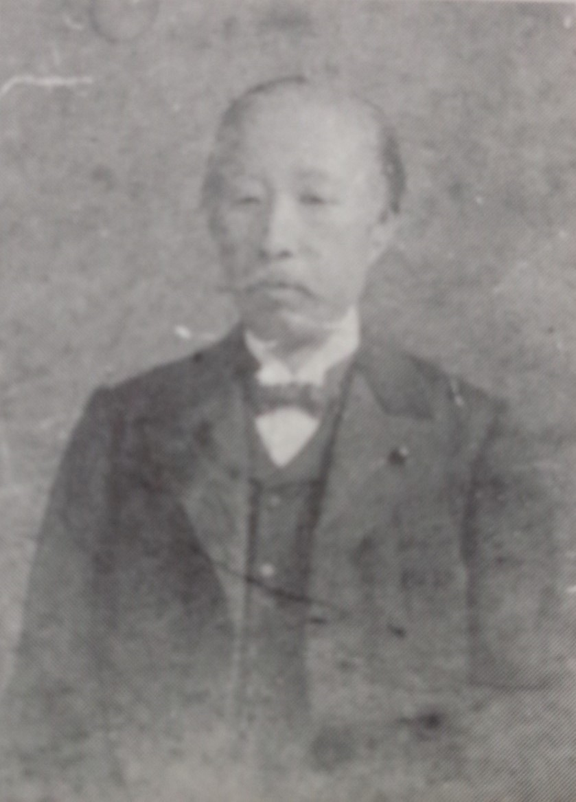 戸田忠行の肖像写真。